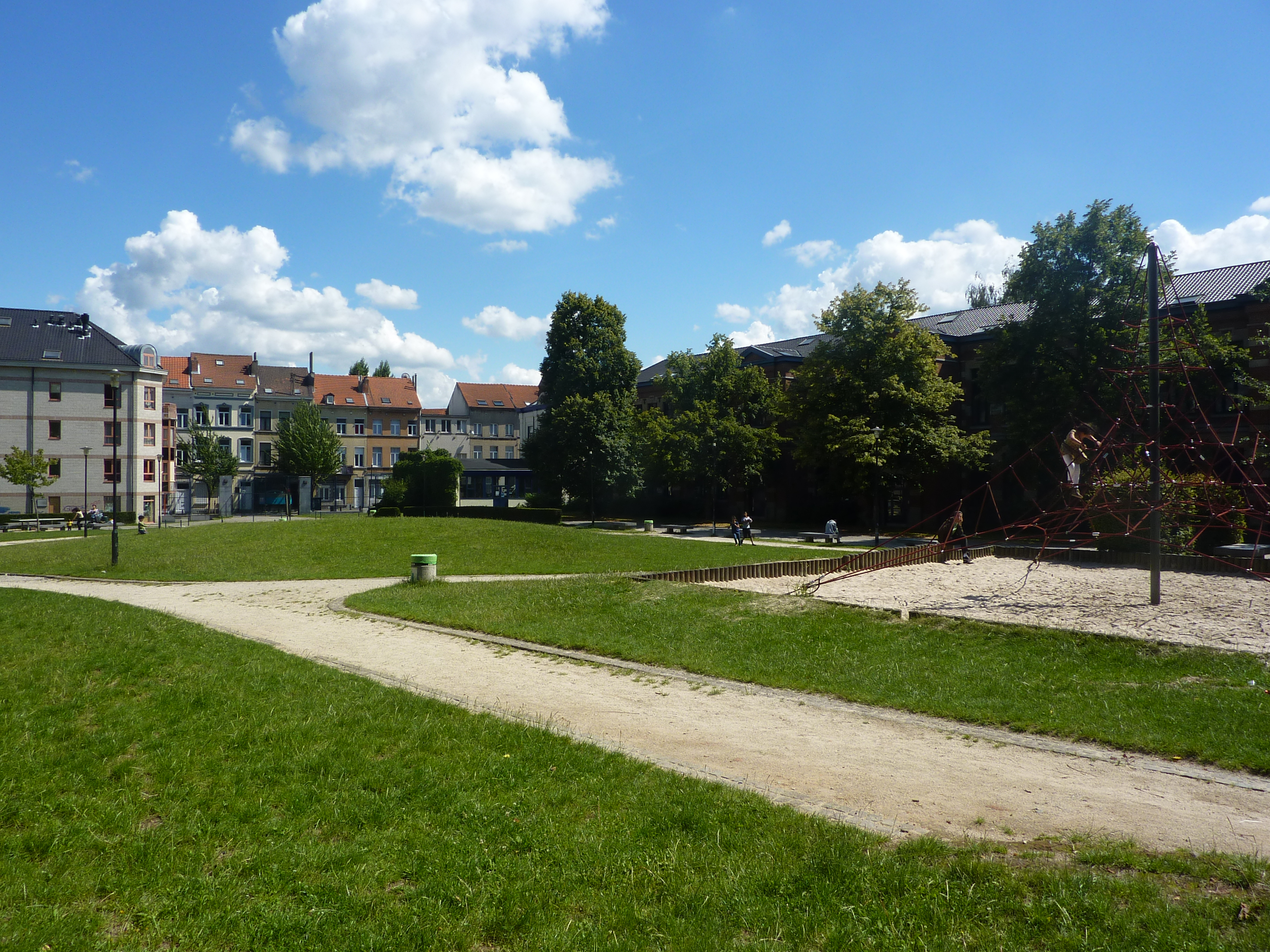 Le parc Rasquinet à Schaerbeek, Bruxelles, Belgique.